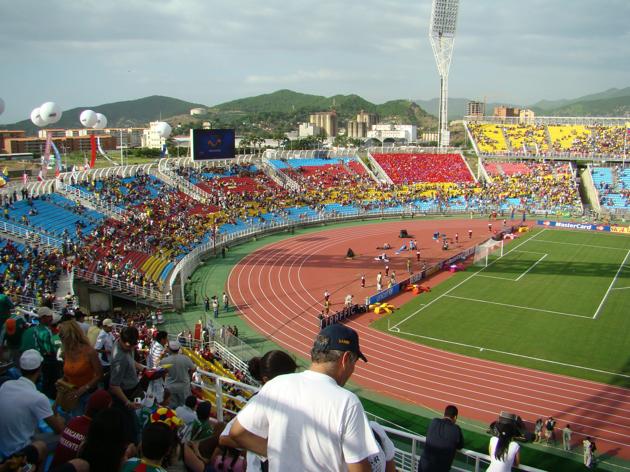 Partido innaugural de la Copa América 2007, Venezuela.